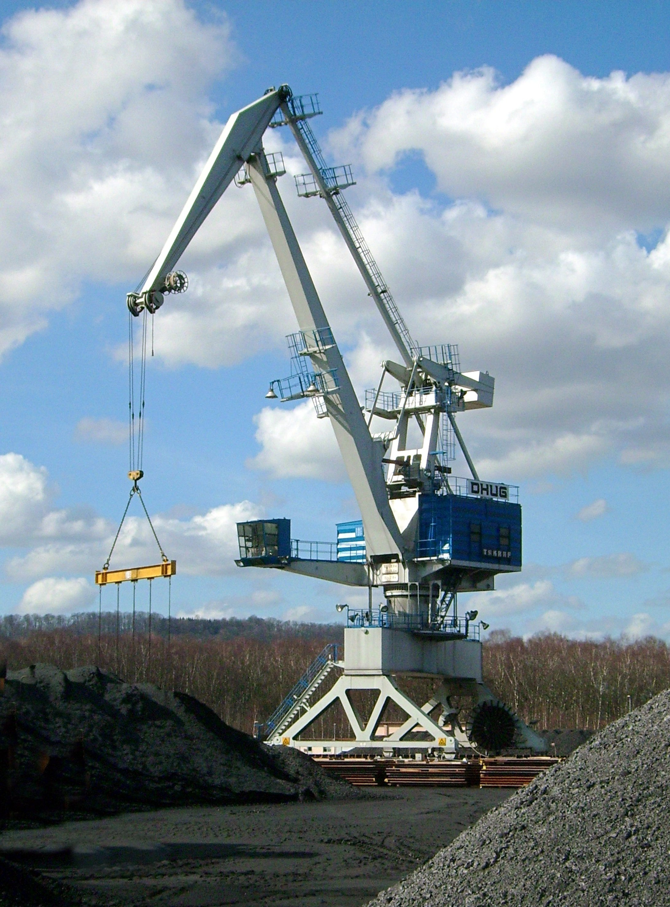 Kran in Dillingen/Saar